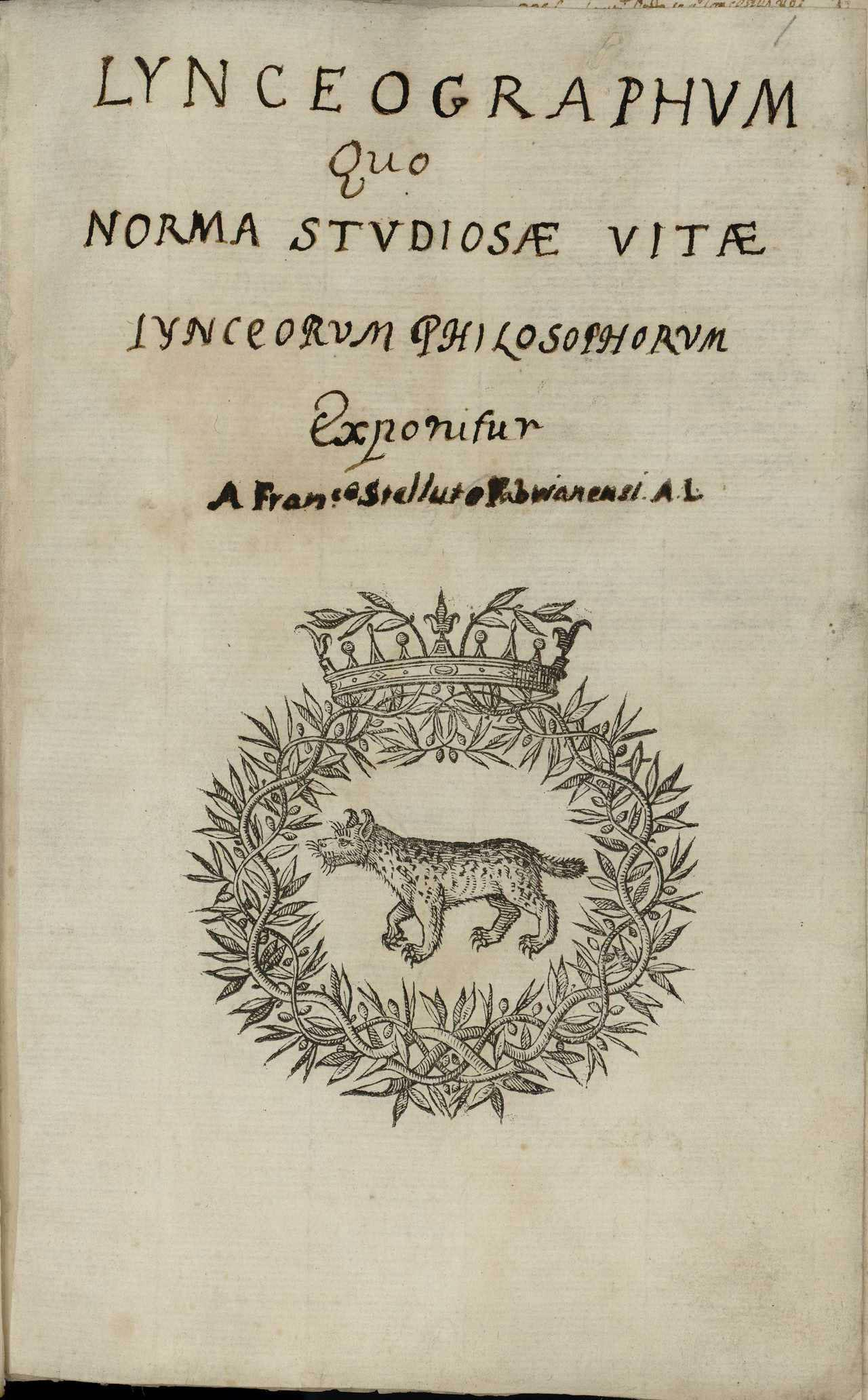 Lynceographum manuscript: title page